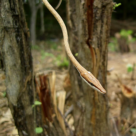 Oxybelis aeneus